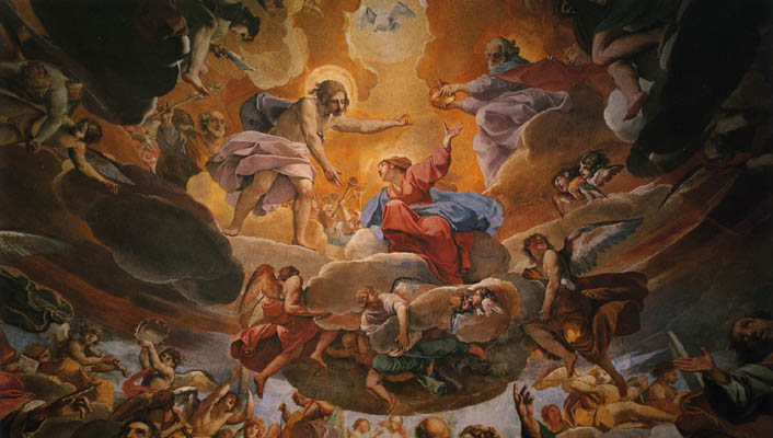 detail